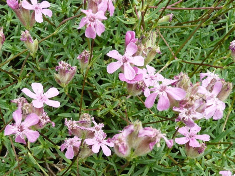 Botanischer Garten Erlangen, 2008